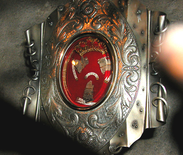 Небольшой реликварий с частичками мощей свв. Виро, Плехельма и Отгера в алтаре собора в Санкт Одилиенберге, пред которыми молятся монахини.